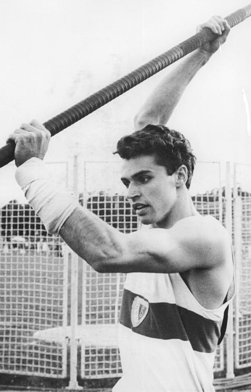 Wolfgang Nordwig Zentralbild Wendorf 12.8.1965 Potsdam Leichtathletik-Abendsportfest im Potsdamer Luftschiffhafenstadion am 11.8.65 Im Stabhochsprung stellte Wolfgang Nordwig (SC Motor Jena) mit ausgezeichneten 5,05 m eine neue europäische Jahresbestleistung auf.